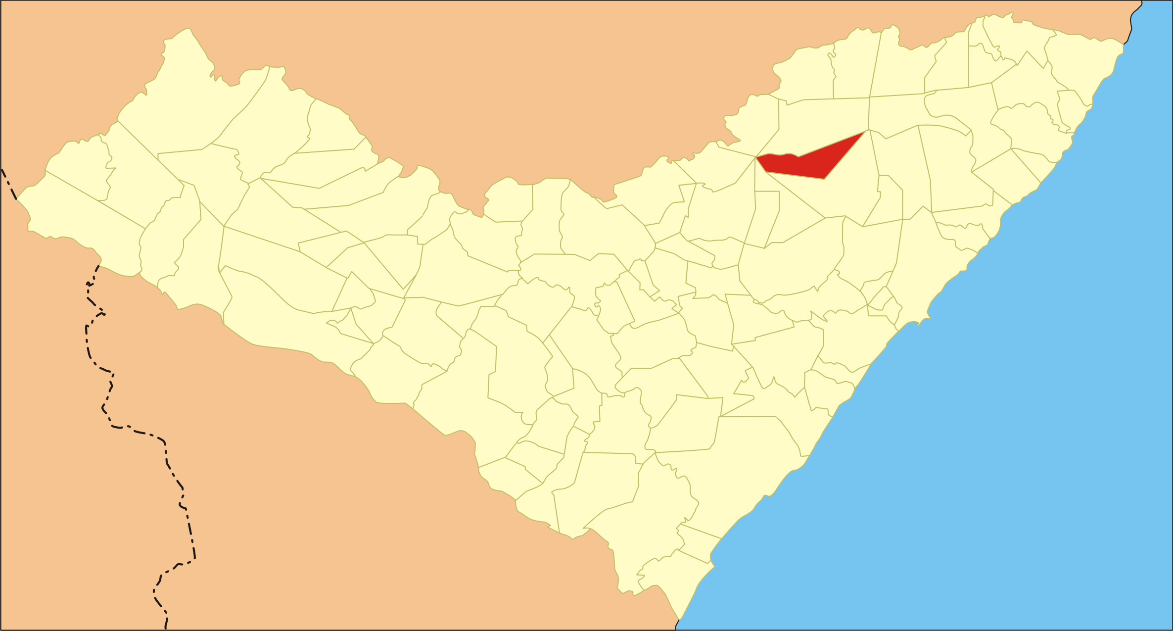 Localização da cidade no estado de Alagoas.